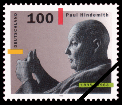 Zum 100. Geburtstag von Paul Hindemith, Briefmarke der Deutschen Post, 100 Pf., Ausgabe 9. November 1995, Mi.-Nr. 1827.